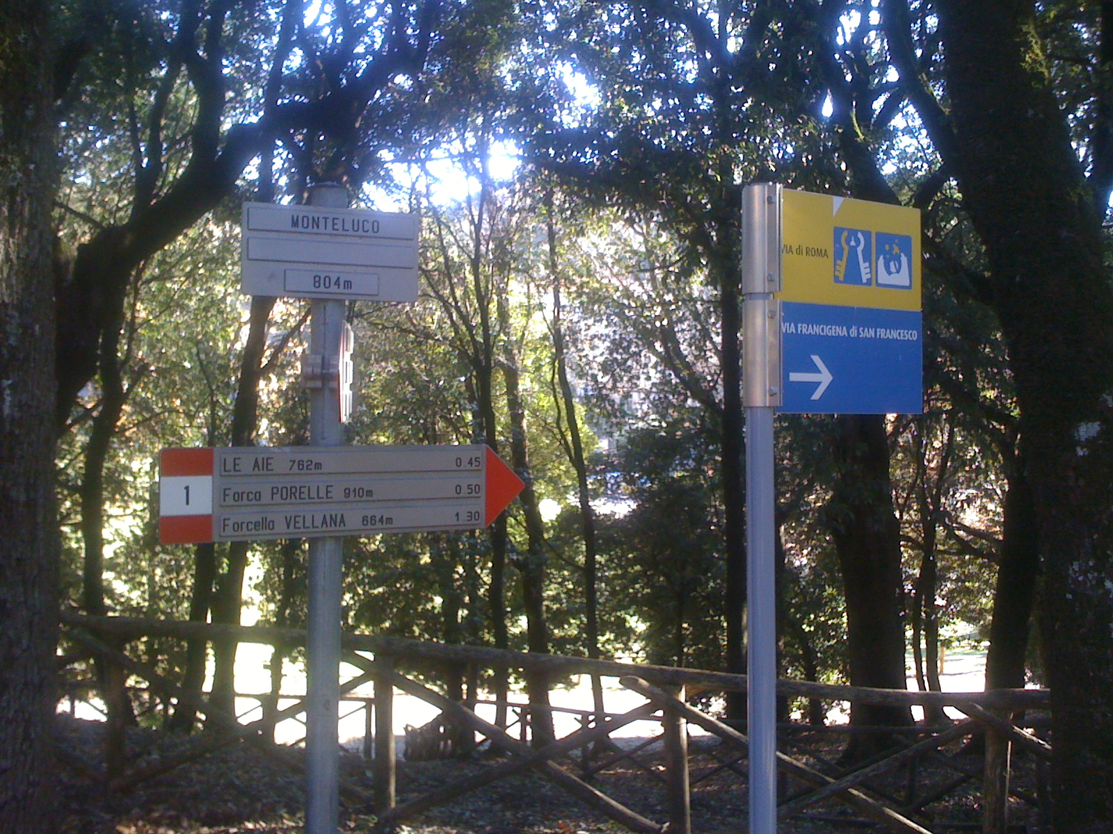 Indicazioni sentieri C.A.I.